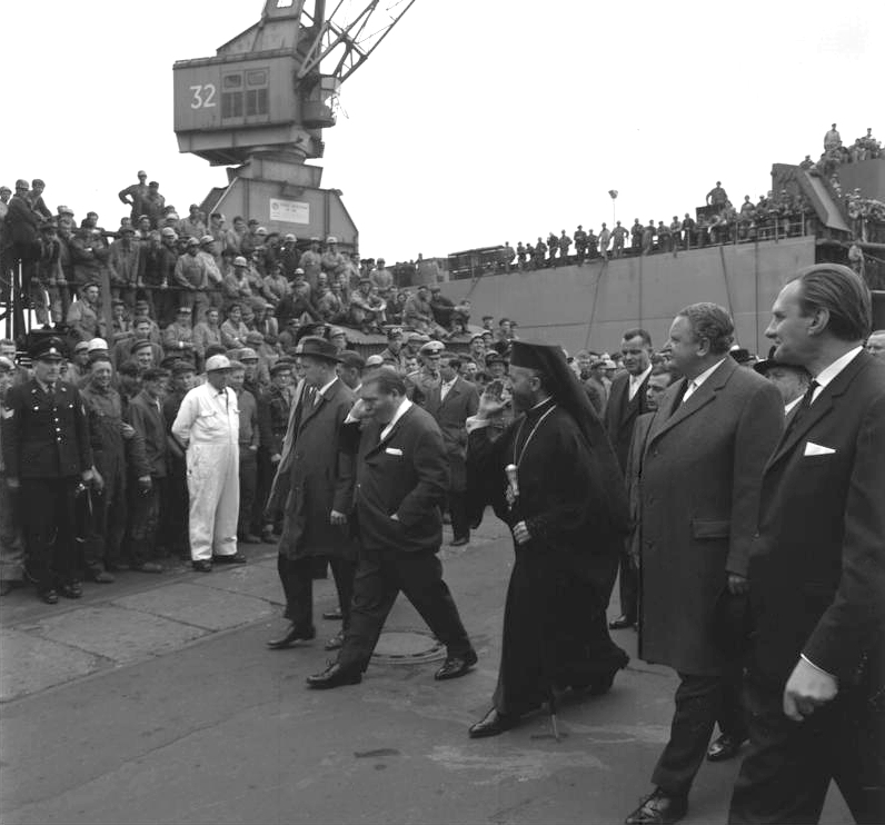 Staatsbesuch Zypern Besuch der Schlieker Werft Hamburg